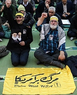 نماز جمعه تهران / ۲۲ دی ۹۶